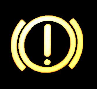 Feststellbremsenleuchte